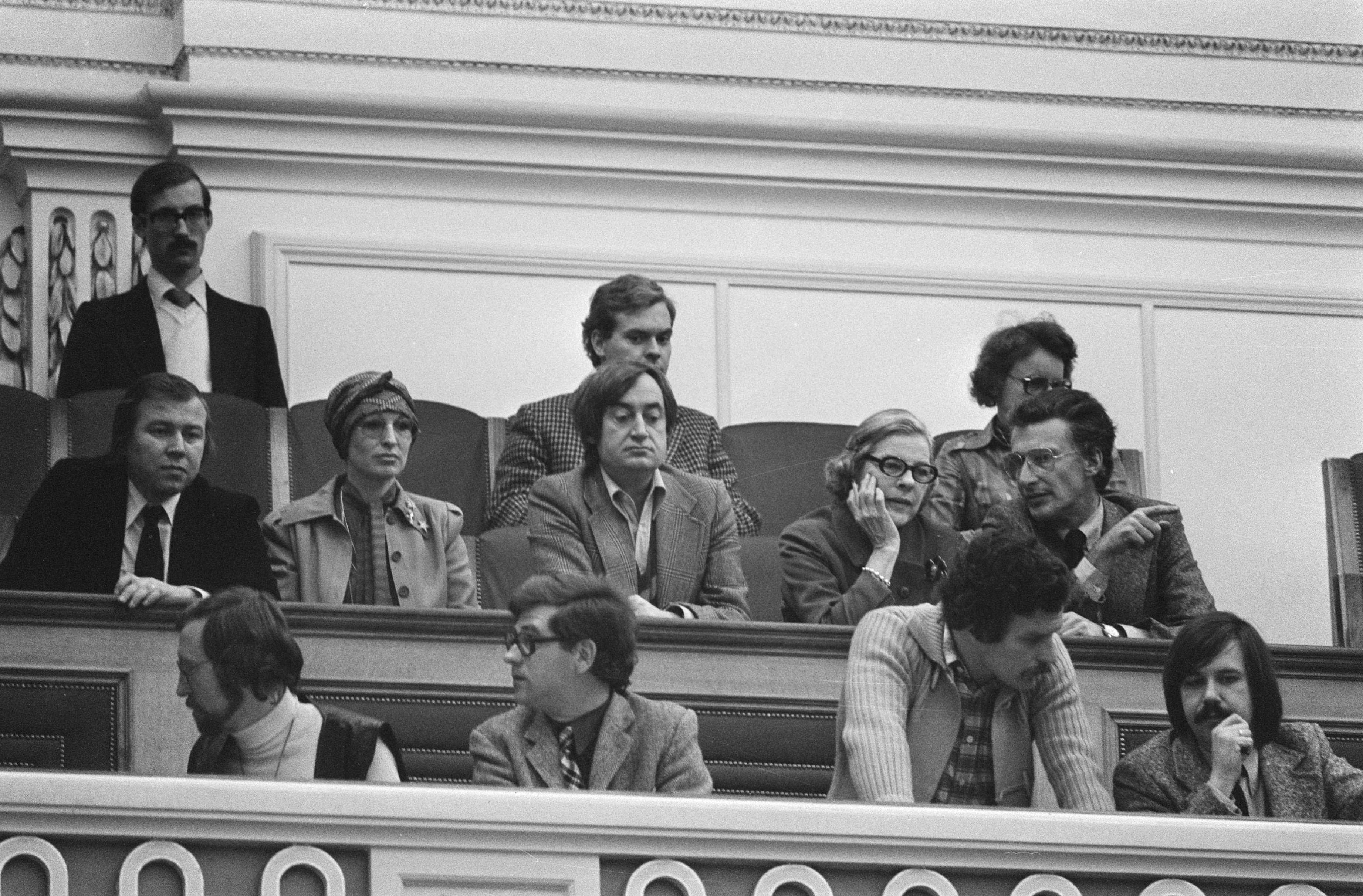 Collectie / Archief : Fotocollectie Anefo Reportage / Serie : [ onbekend ] Beschrijving : Tweede Kamer Volkshuisvesting; op publieke tribune v.l.n.r. staatssecretaris Van Dam , Liesbeth List , Cees Nooteboom , Mary McCarthy en Harry Mulisch / Datum : 4 november 1975 Trefwoorden : Staatssecretarissen, tribunes Persoonsnaam : Cees Noteboom Fotograaf : Peters, Hans / Anefo Auteursrechthebbende : Nationaal Archief Materiaalsoort : Negatief (zwart/wit) Nummer archiefinventaris : bekijk toegang 2.24.01.05 Bestanddeelnummer : 928-2532